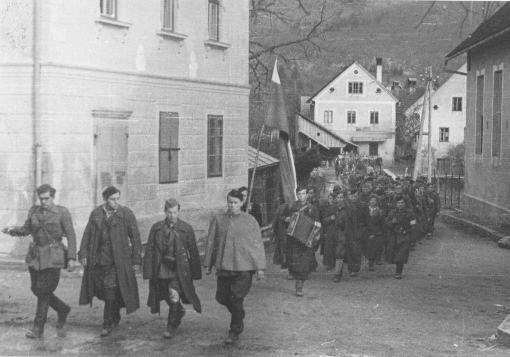 Proslava trogodišnjice Osvobodilne fronte u Poljanama 27. aprila 1944.